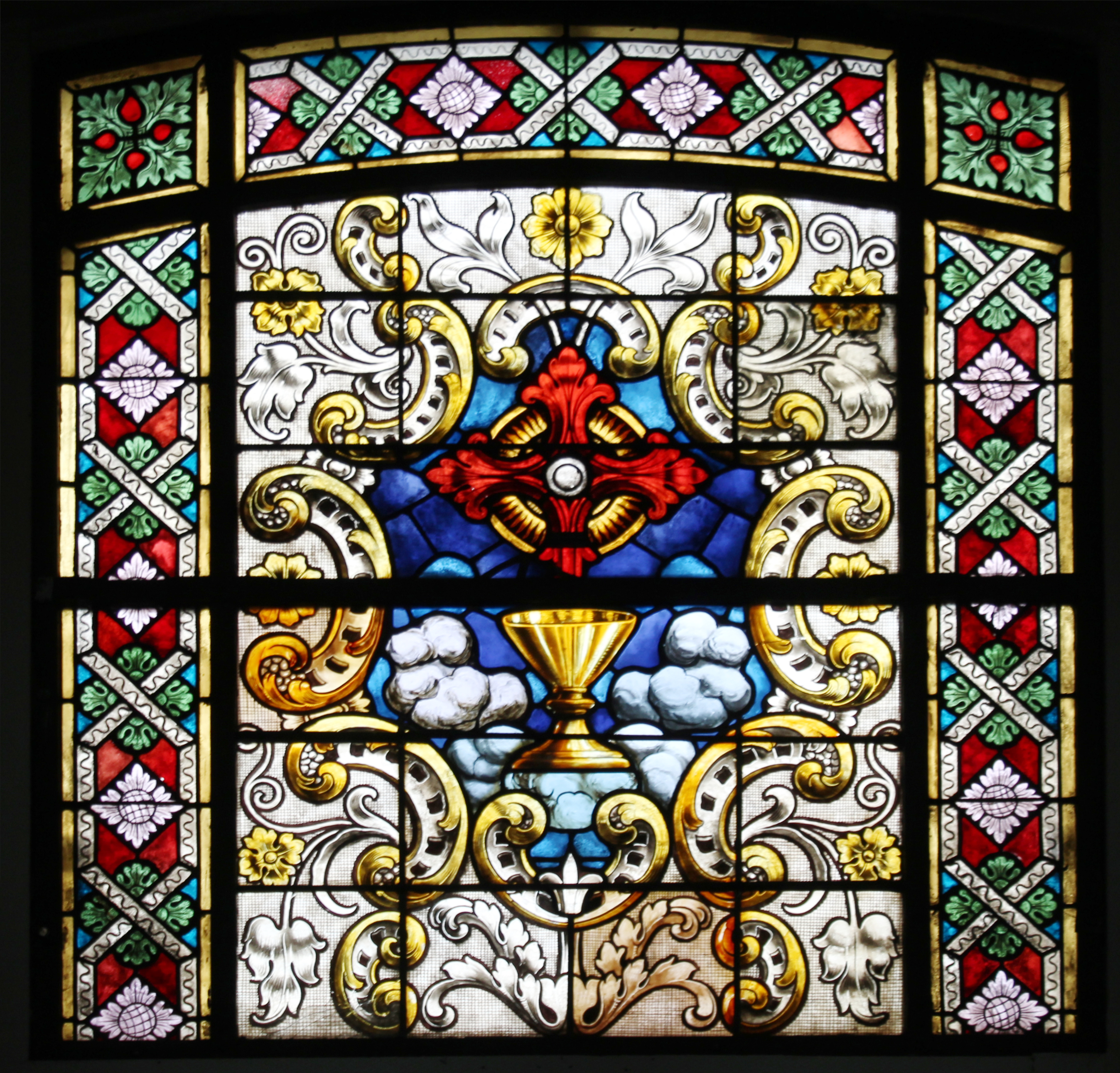 Ev. Kirche Schwalbach, Schöffengrund, Lahn-Dill-Kreis, Hessen, Deutschland